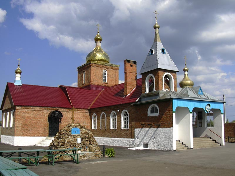 Открыт в 1994 году.